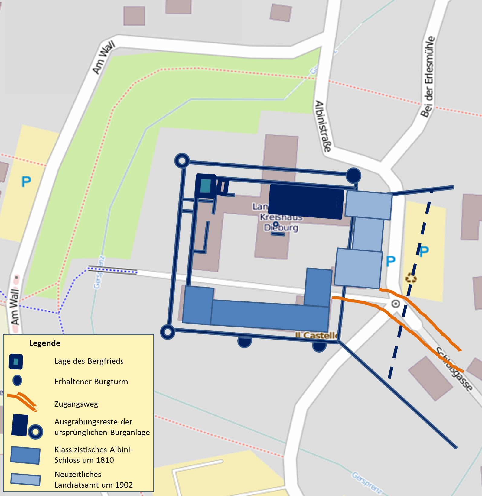 Lage und Größe der Burganlage Dieburg in Dieburg. Schematisiert sind die ehemaligen bekannten Burgteile vom Mittelalter bis in die Neuzeit eingetragen. Die Anbindung an die Stadtmauer der östlich gelegenen Altstadt und der ursprüngliche Zugangsweg zwischen Burg und Ort sind eingezeichnet. Die Kartenvorlage basiert auf OpenStreetMap. Quelle Kartenmaterial: Landkarte: korr. Ausschnitt OpenStreetMap Quelle Grundrisse: Rudolf Knappe: Mittelalterliche Burgen in Hessen: 800 Burgen, Burgruinen und Burgstätten. 3. Aufl. Wartberg-Verlag. Gudensberg-Gleichen 2000. ISBN 3-86134-228-6, S. 534f.